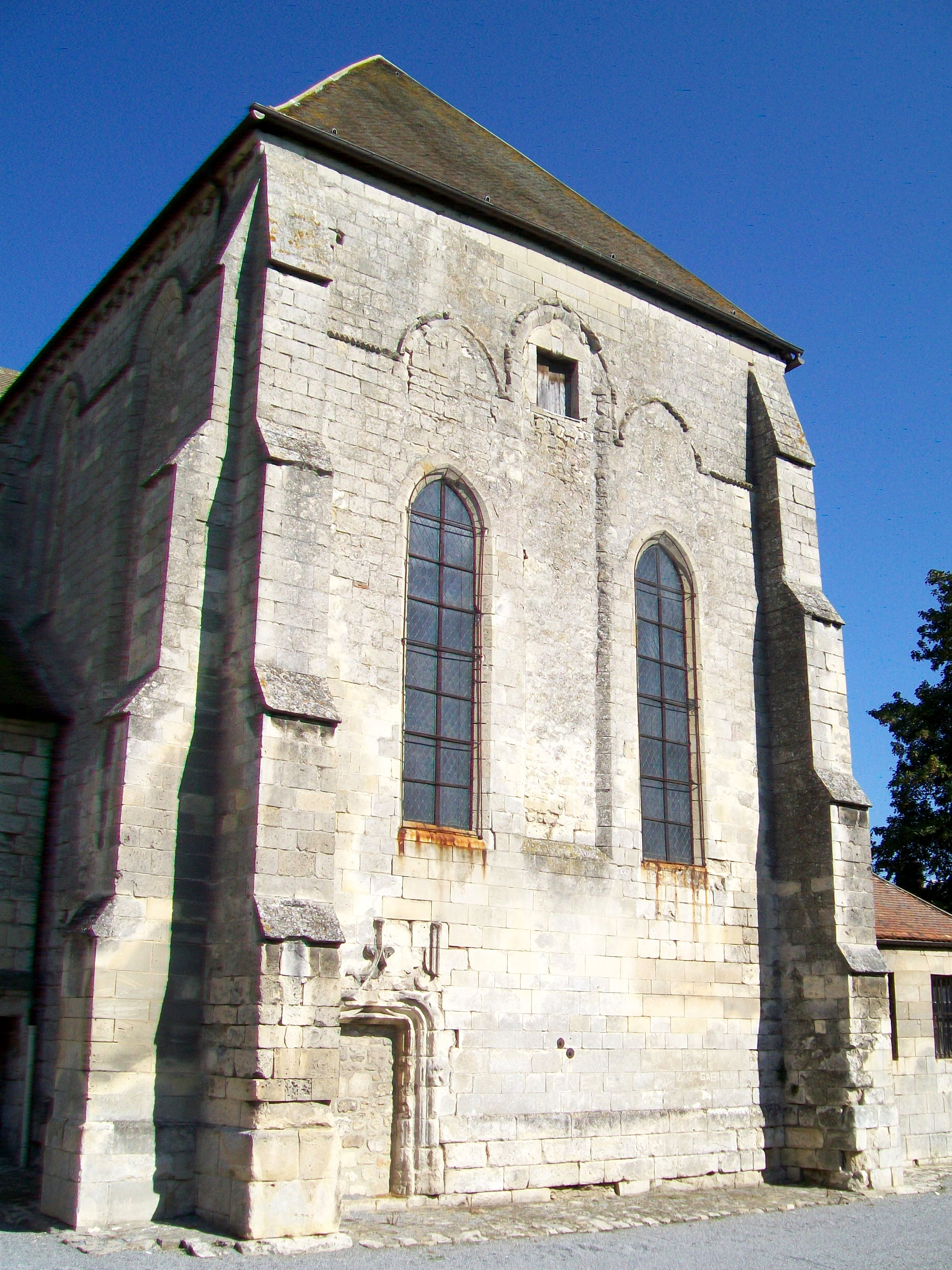 Le transept sud, partie la plus ancienne de l'église en tant qu'ancienne chapelle du palais royal ; façade sud.